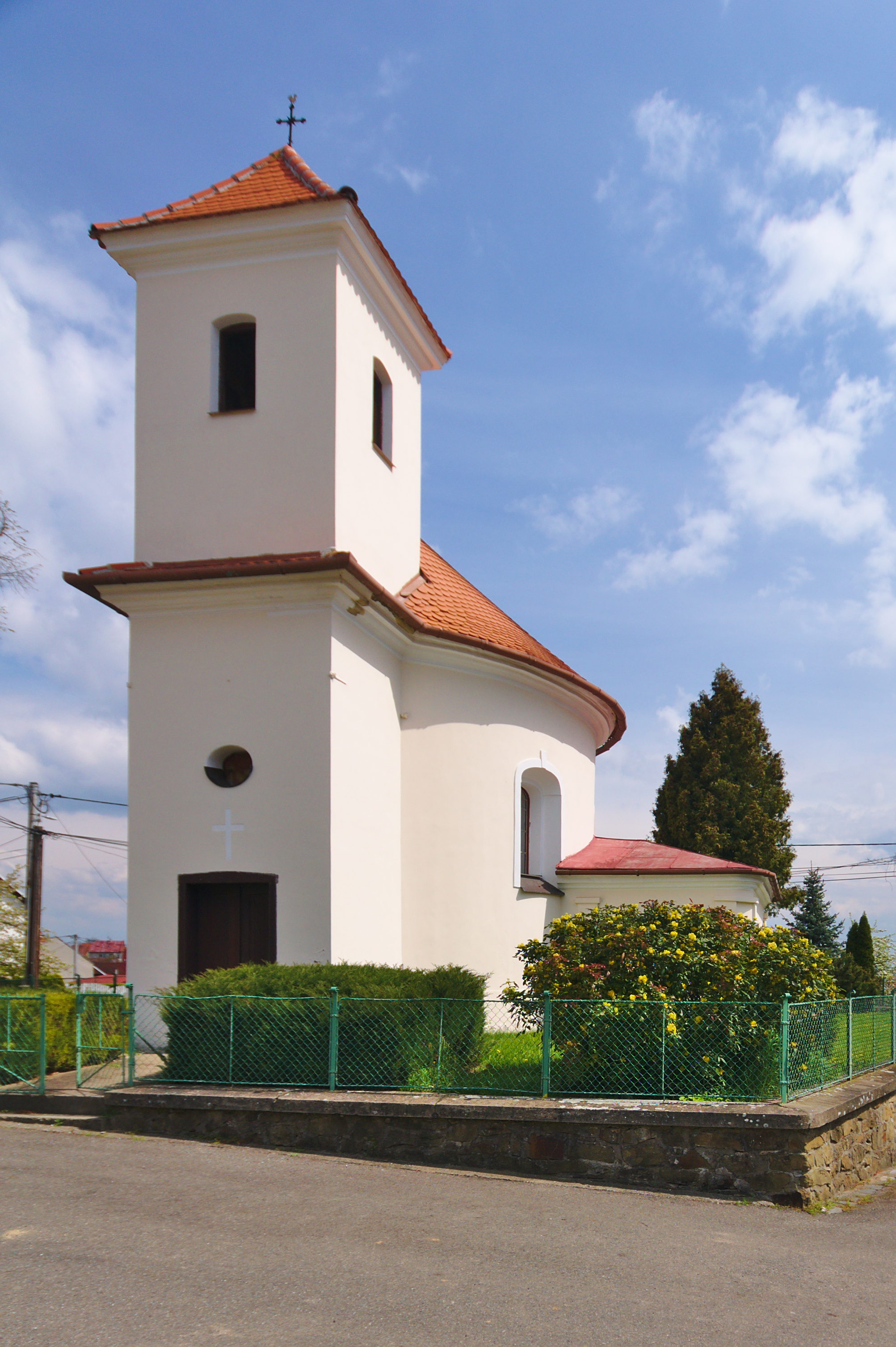 Kaple Nanebevzetí Panny Marie, Seloutky, okres Prostějov